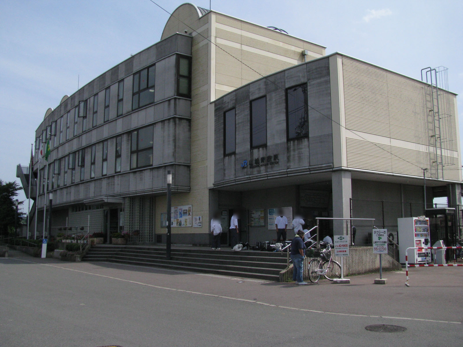 奈良線山城青谷駅